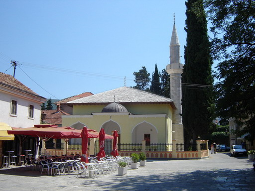 Osman pašnia džamija u Trebinju.